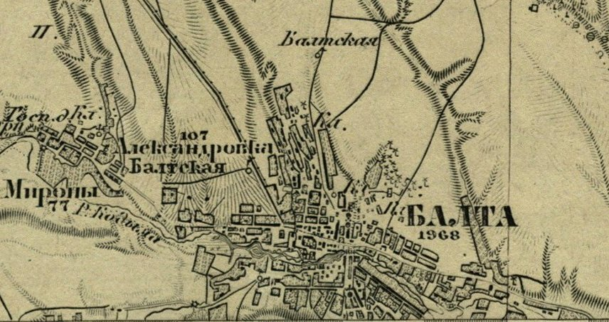 Балта. Фрагмент карты работы Ф. Ф. Шуберта. Из комплекта топографических карт Подольской губернии. 1860-1890 гг. Масштаб: 3 версты в дюйме. (1 см-1260м) .(1:126000)